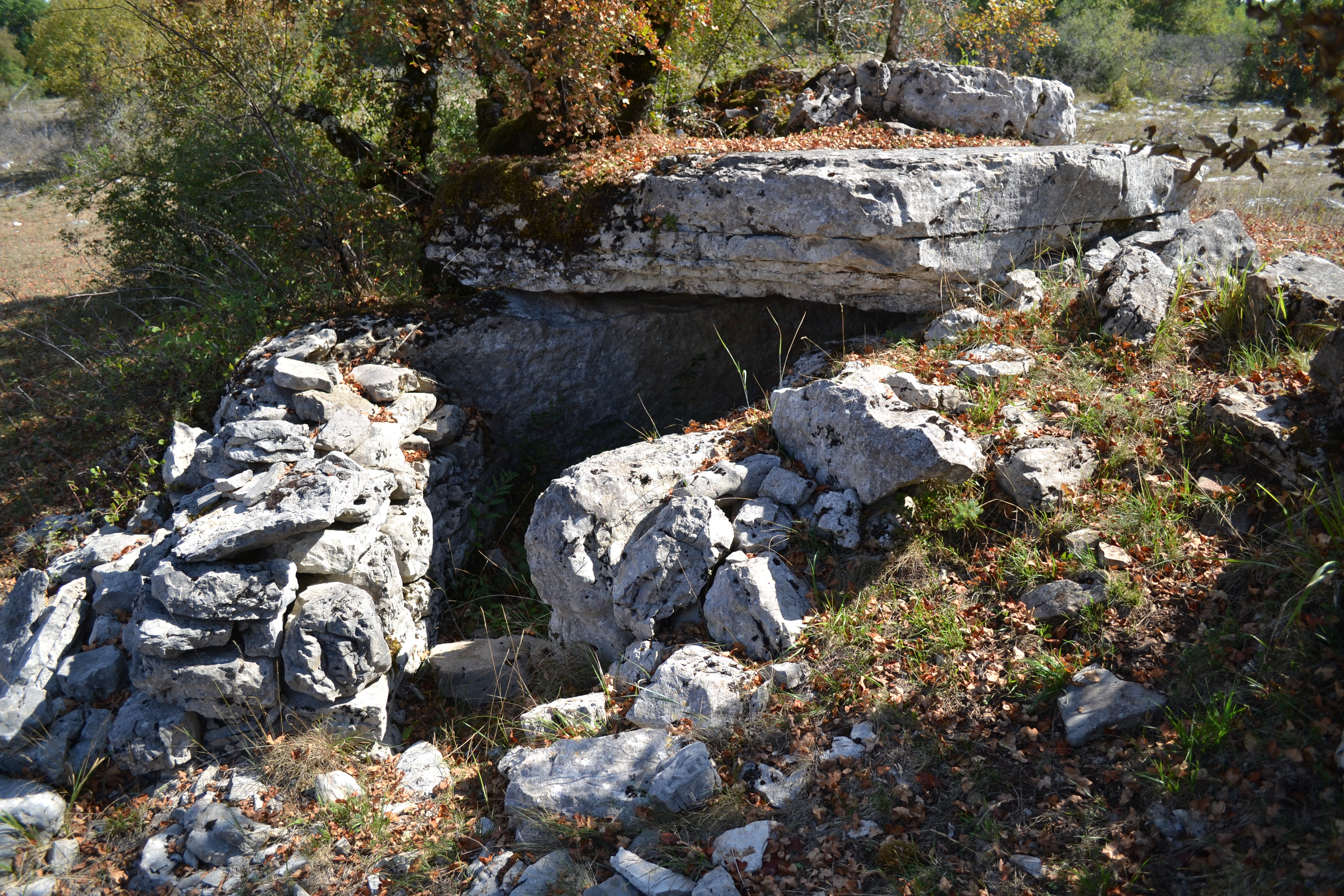 Dolmen de Garivals, Assier, Lot,France